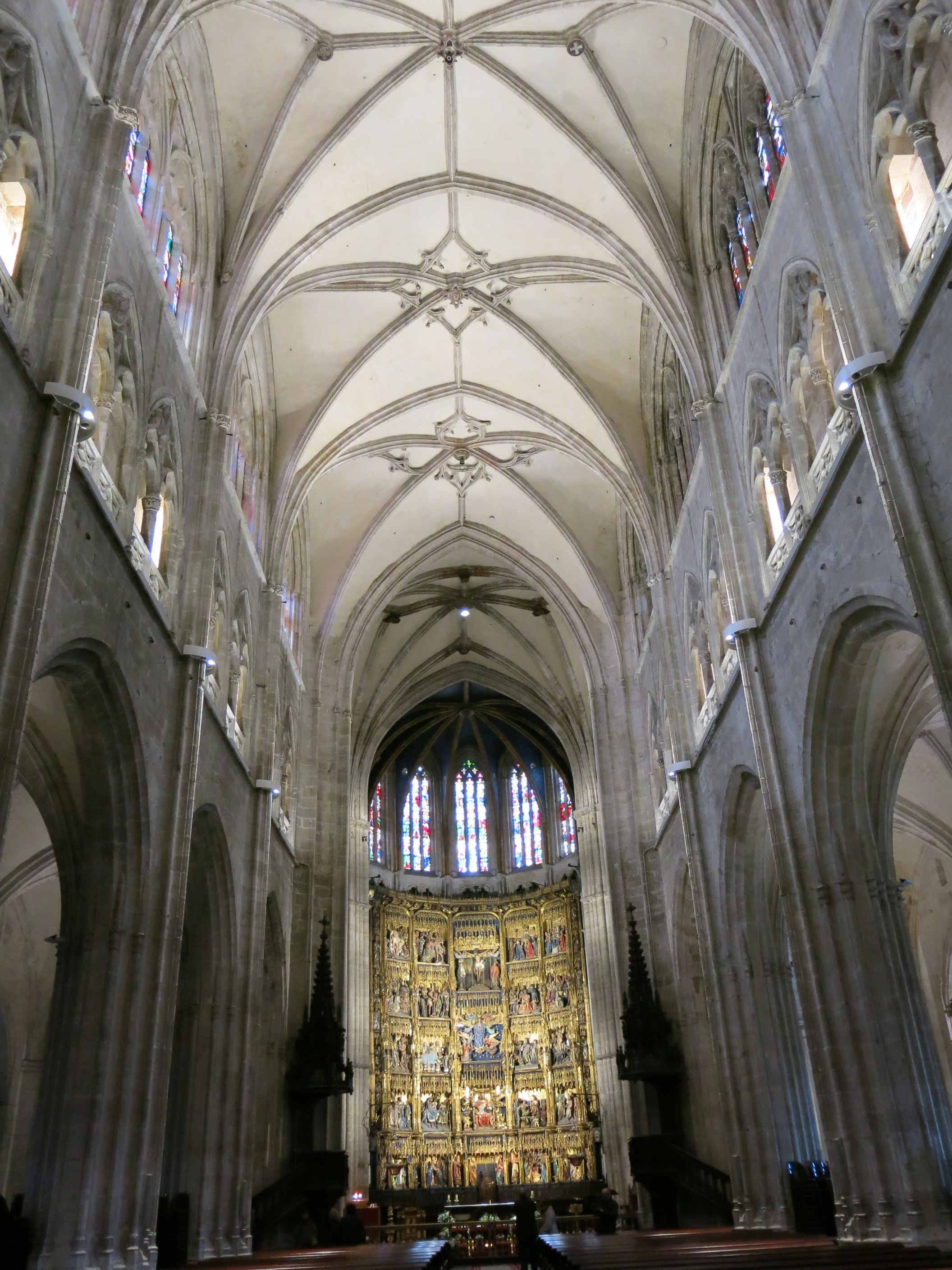 Catedral de San Salvador